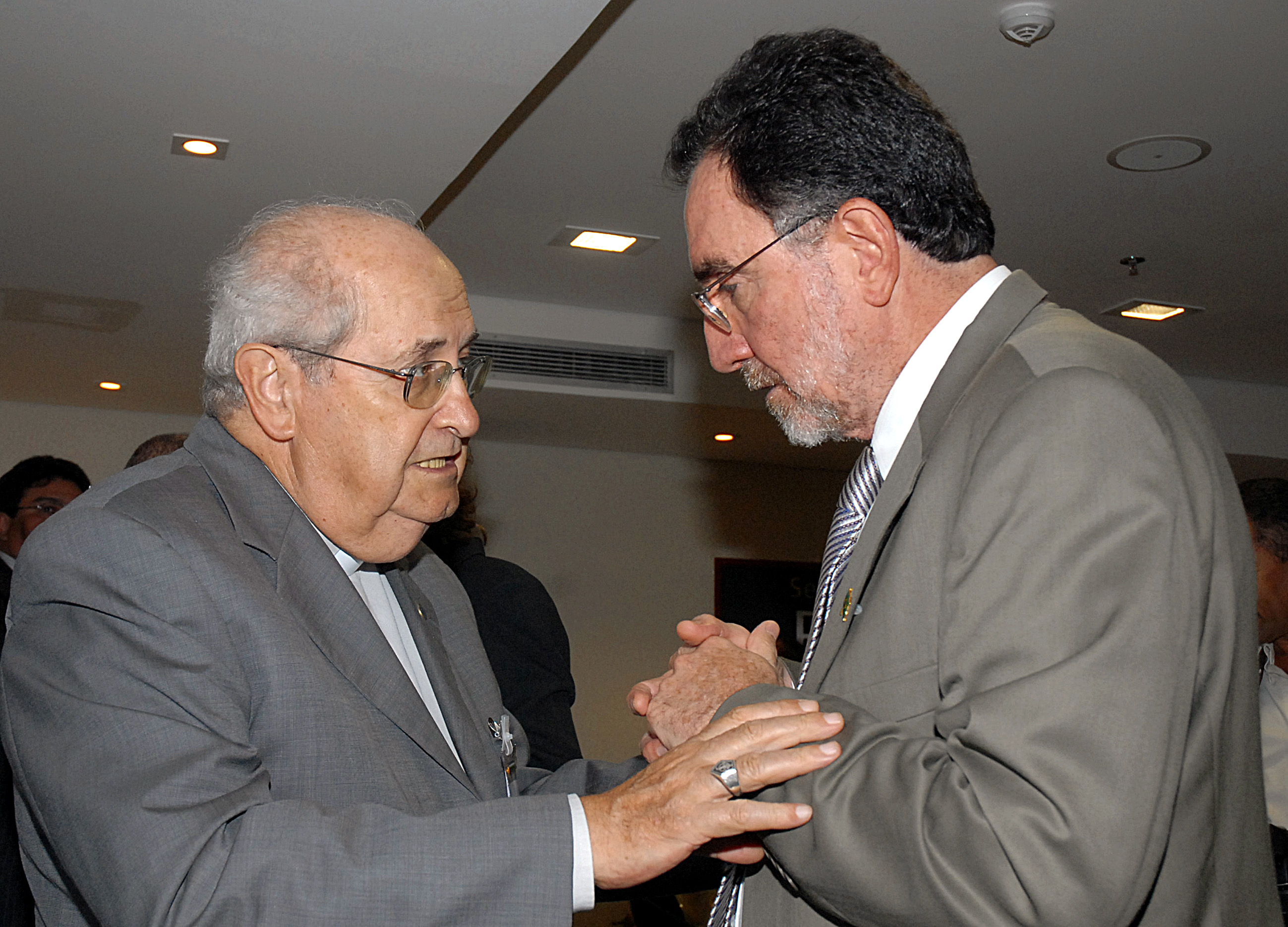 presidente do Conselho de Segurança Alimentar de Minas Gerais (Consea-MG), dom Mauro Morelli, e o ministro do Desenvolvimento Social, Patrus Ananias, durante o Seminário Nacional sobre Fundos Rotativos Solidários